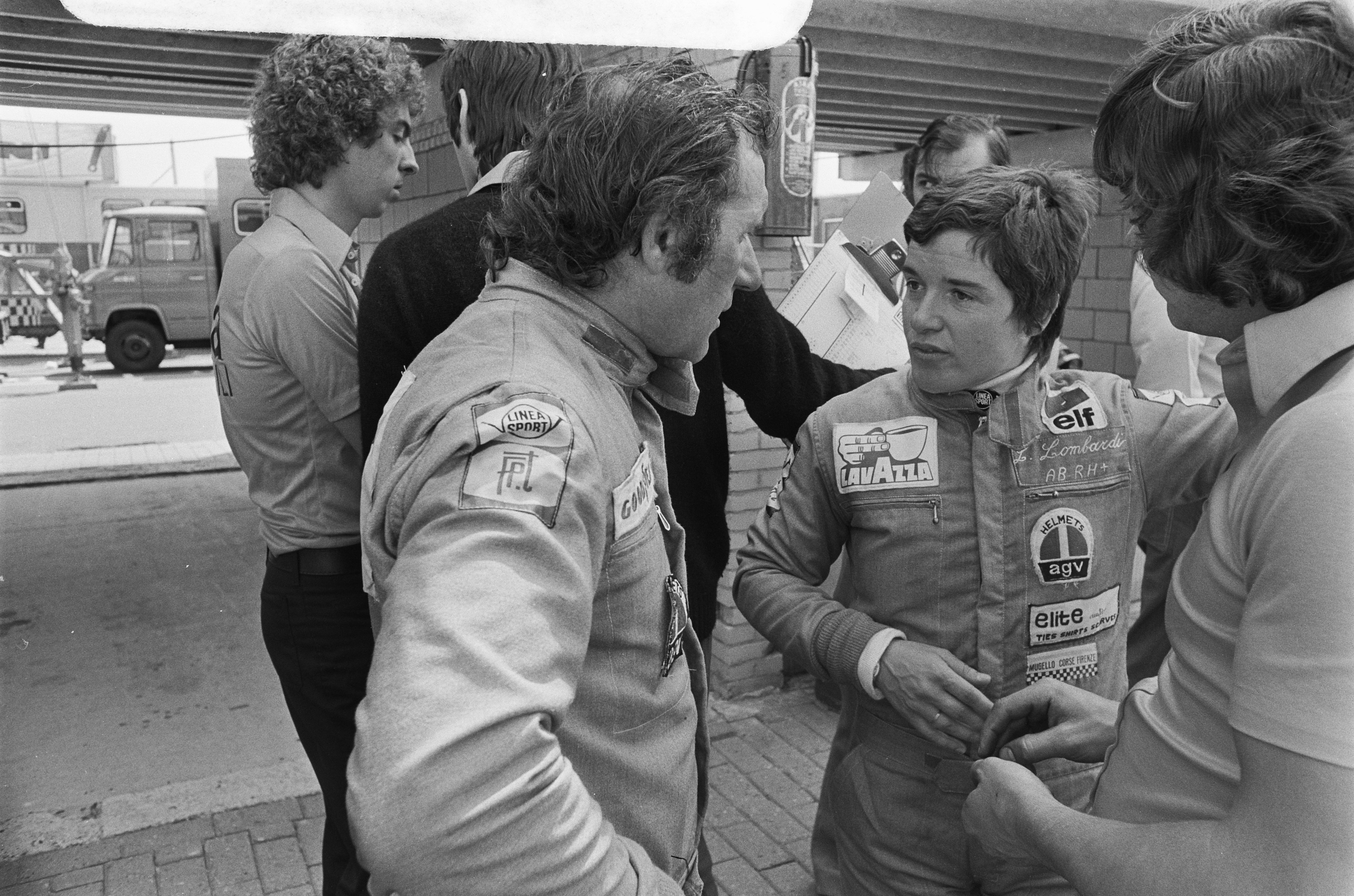 Lella Lombardi et Vittorio Brambilla discutent lors des essais du Grand Prix des Pays-Bas 1975